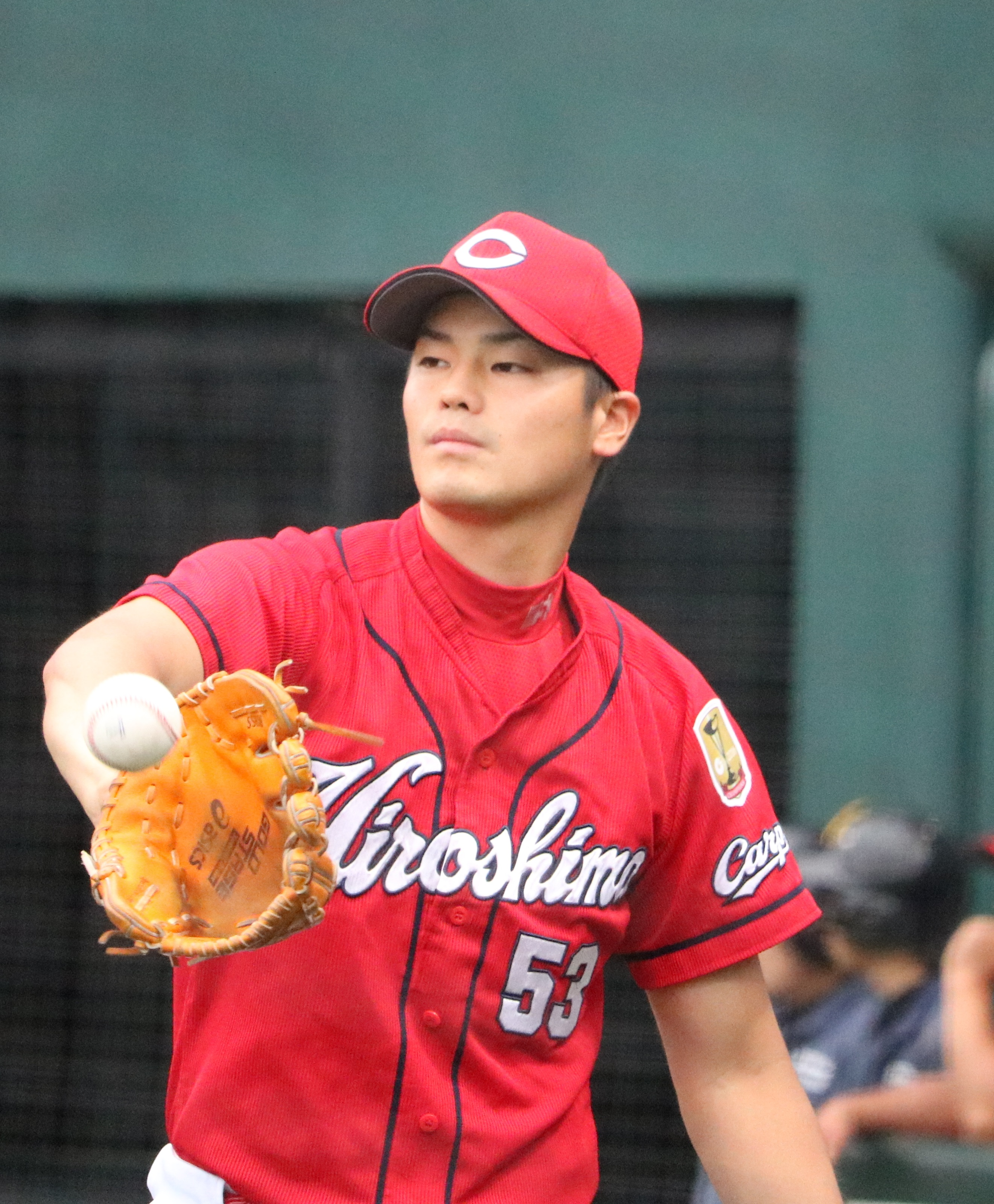 2017/6/21 ウエスタン・リーグ 広島東洋カープ×福岡ソフトバンクホークス(タマホームスタジアム筑後)にて